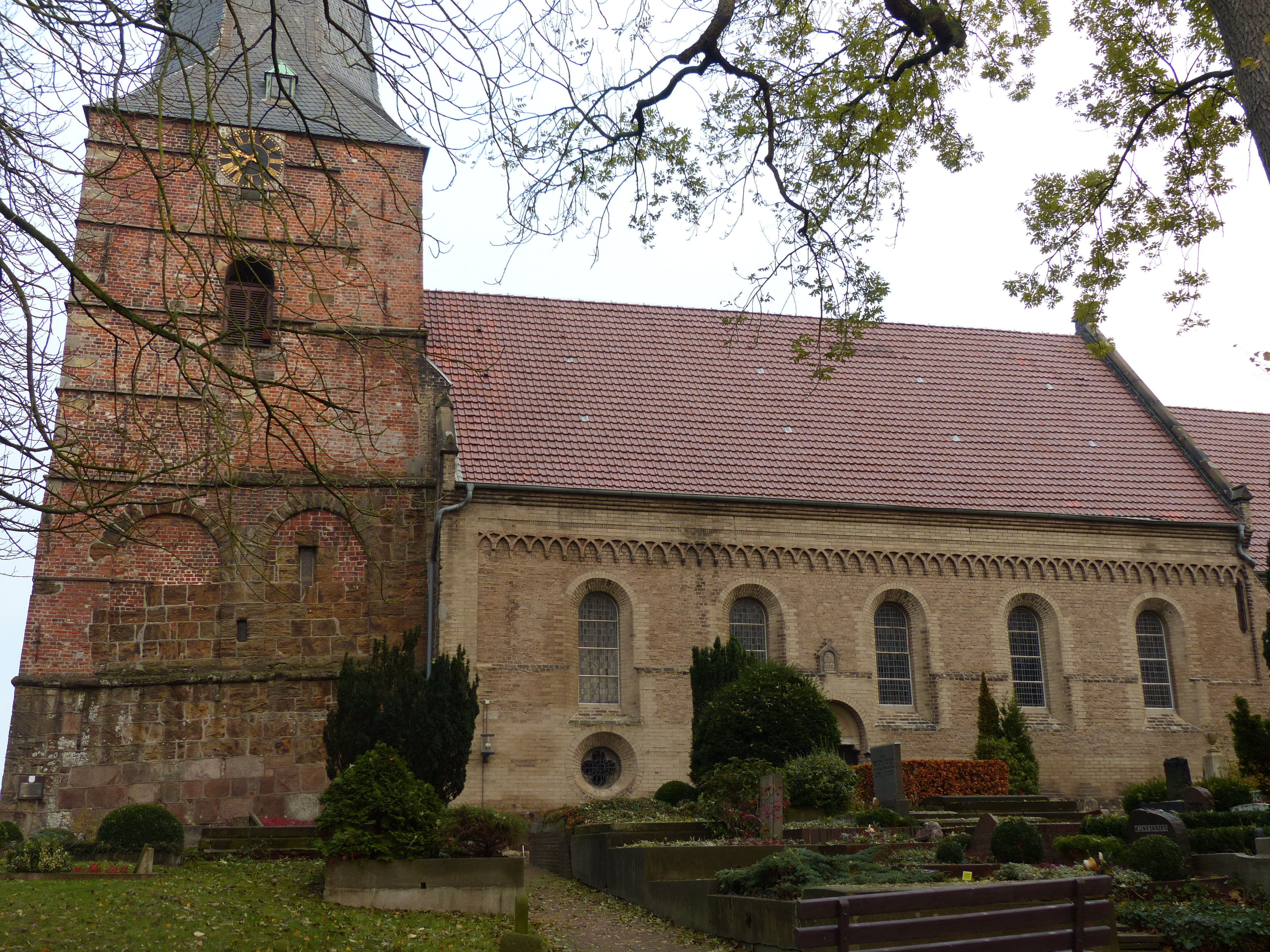 Südfassaden von Turm und Schiff der St.-Hippolyt-Kirche in Blexen